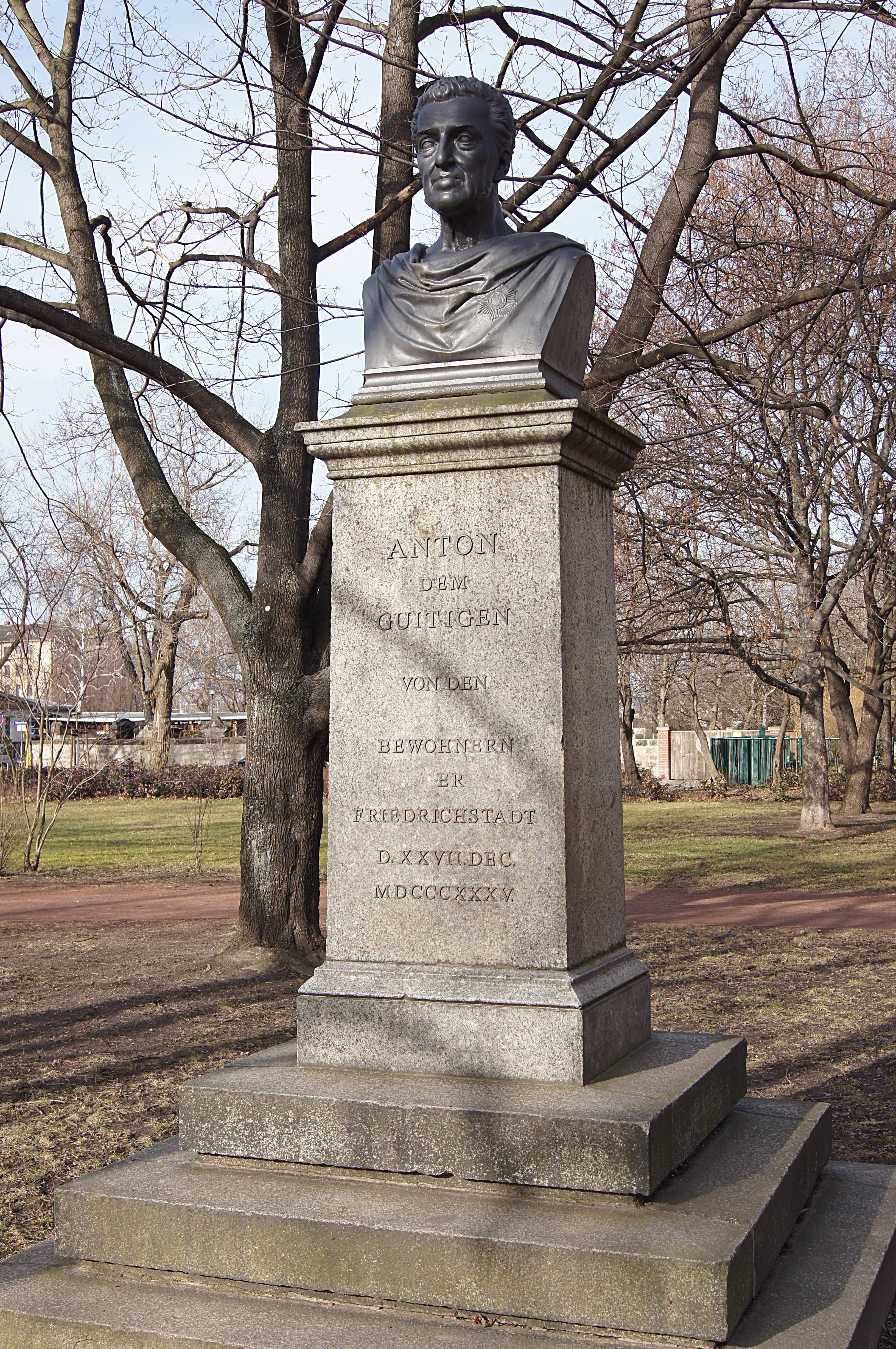 Denkmal für Anton dem Gütigen, König Anton-Denkmal , Hohenthalpatz